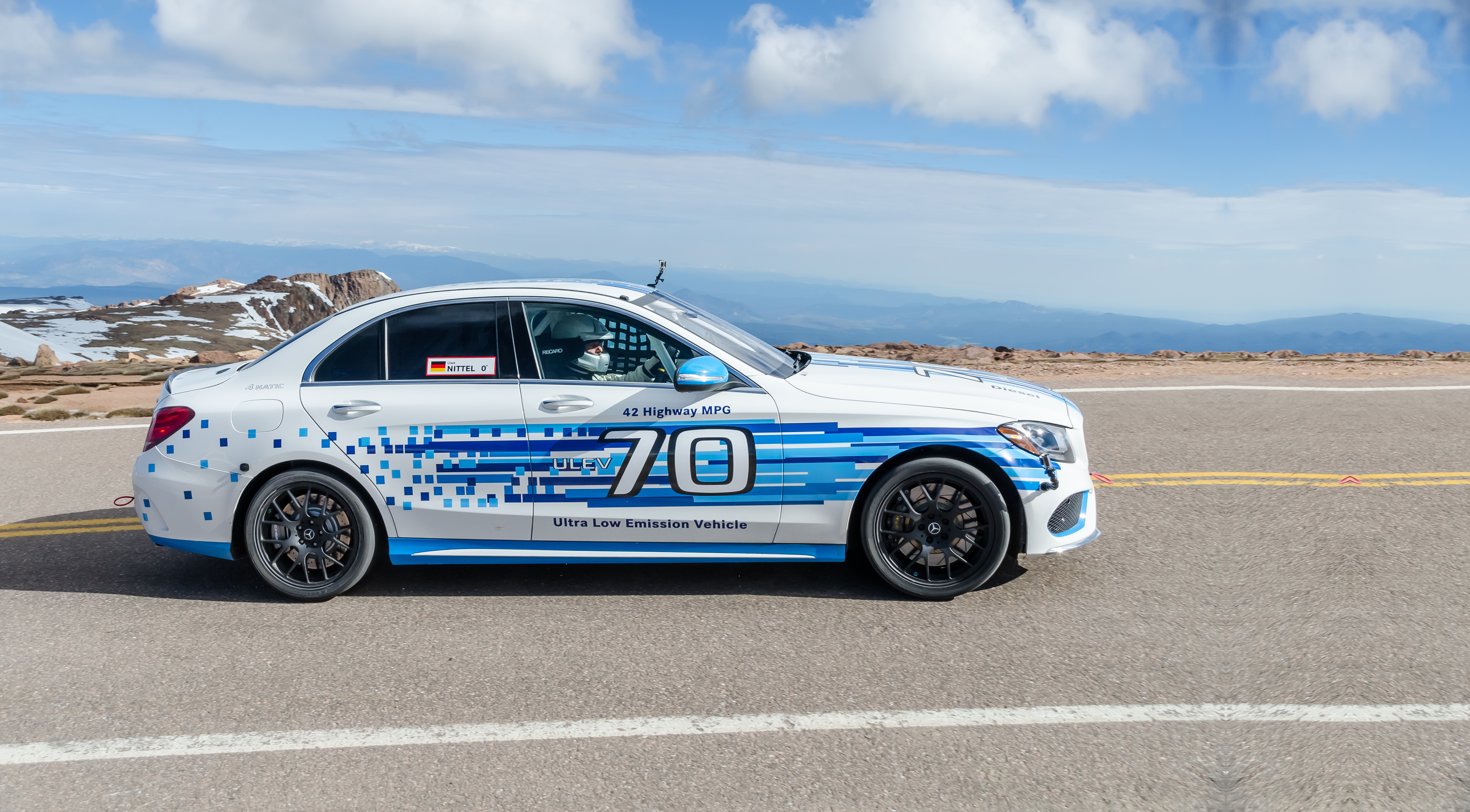 Der schwäbische Motorsport-Profi Uwe Nittel ist schnellster Diesel-Pilot im Werks-Mercedes C300d 4matic.